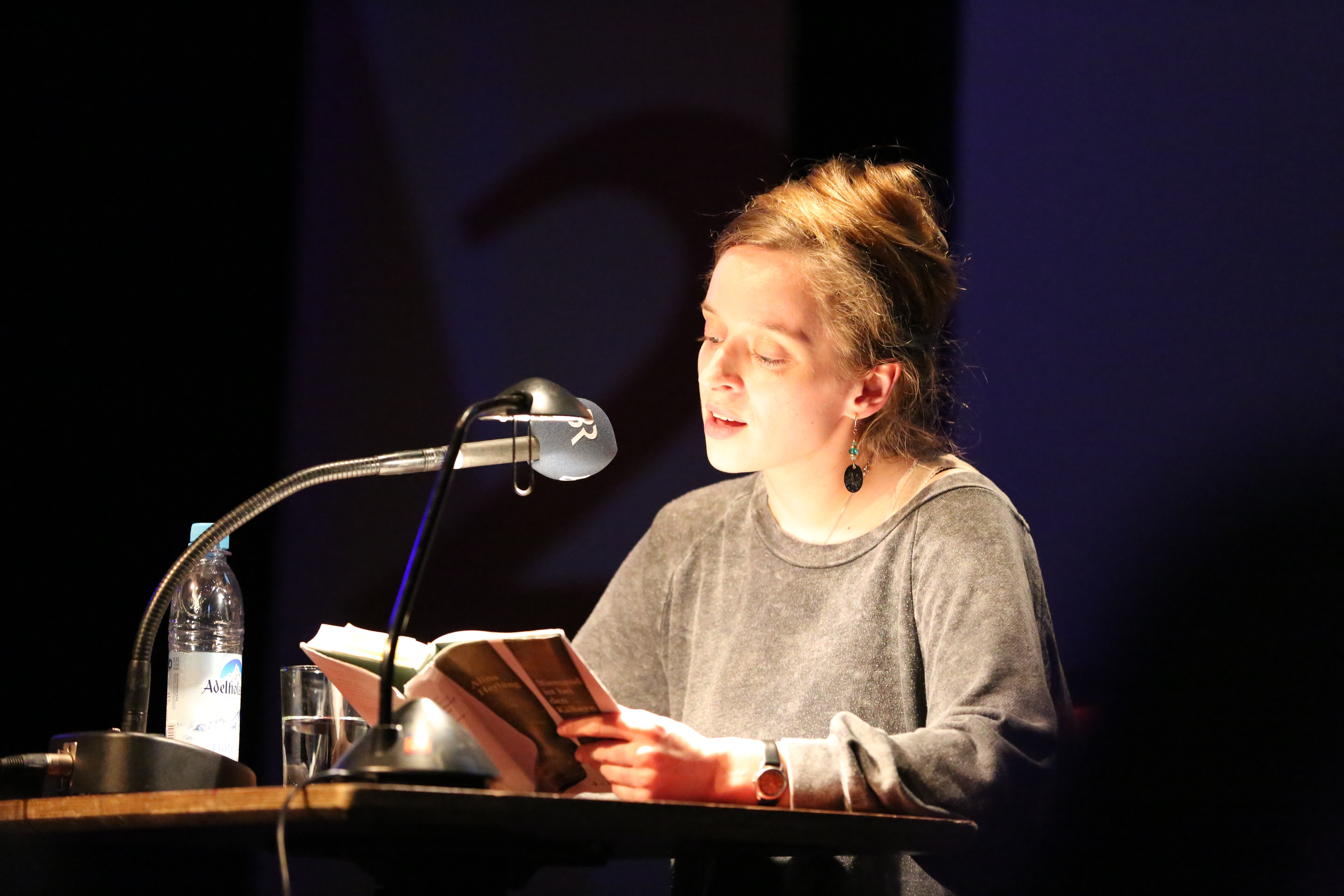 Alina Herbig liest aus ihrem Roman "Niemand ist bei den Kälbern" bei den 17. Wortspielen in München